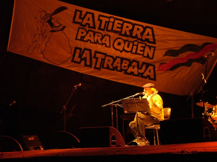 Fotografía del cantante y compositor de Uruguay, Daniel Viglietti en un Festival por los trabajadores de la caña de azucar (peludos) en Bella Union (Artigas, Uruguay).